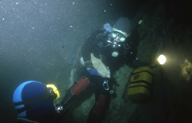 1981年岩手県龍泉洞 水深73m 鶴町、須賀。